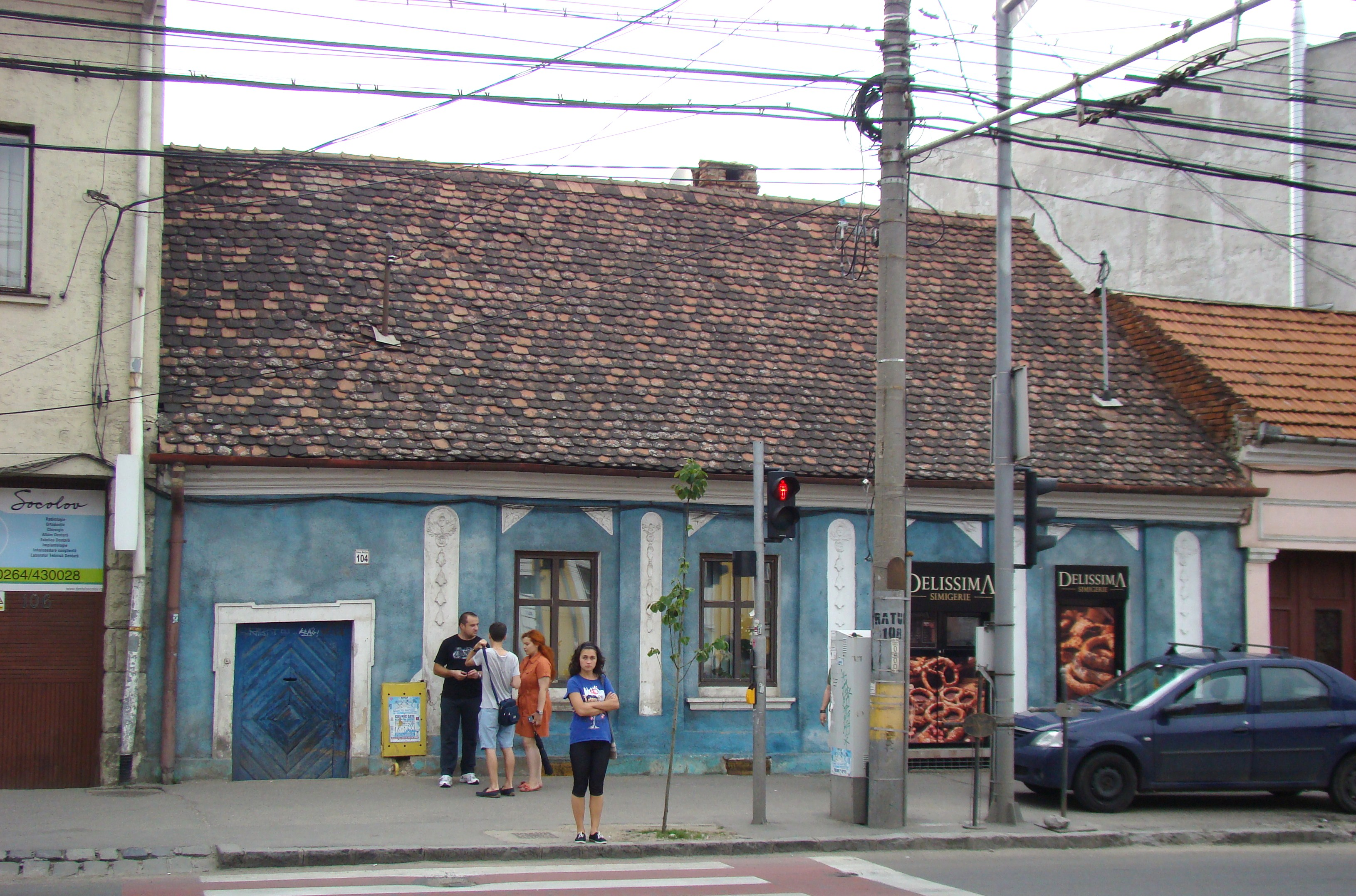 Clădire monument istoric, Calea Moților, nr. 104